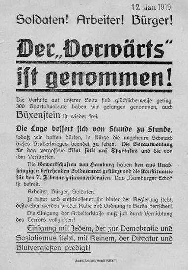 "Der 'Vorwärts' ist genommen" - Plakat zur Rückeroberung des Vorwärtsgebäudes während des Spartakusaustands